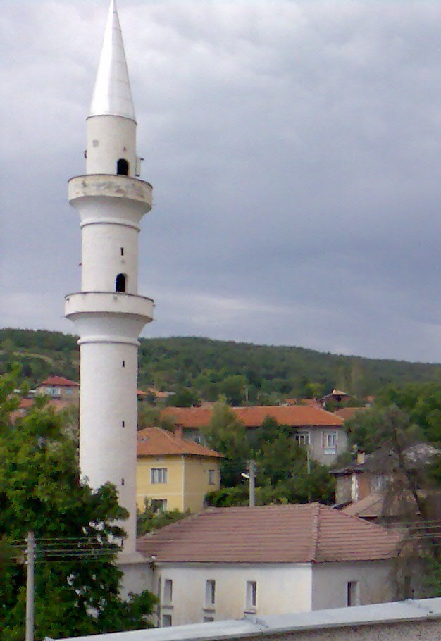 Джамията в село Туховища